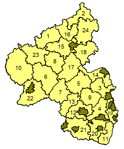 Landkreise in Rheinland-Pfalz